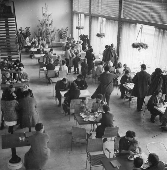 Zentralbild-Sturm 29.12.63 Über 150 000 Westberliner besuchen DDR-Hauptstadt Über 150 000 Westberliner sind am heutigen Sonntag (29.12.63) bis 16 Uhr in die DDR-Hauptstadt gekommen, um ihre Verwandten zu besuchen. Den sonnigen Nachmittag nutzten viele Westberliner Besucher, um mit ihren Gastgebern vor allem die Sehenswürdigkeiten zu besichtigen, die in den letzten beiden Jahren in vielen Stadtbezirken der Hauptstadt der DDR entstanden und den meisten Westberlinern noch unbekannt sind. UBz: Ihren Stadtbummel unterbrachen viele Westberliner und ihre Angehörigen, um eine willkommene Erfrischung in der Milchbar der Karl Marx-Allee einzunehmen.